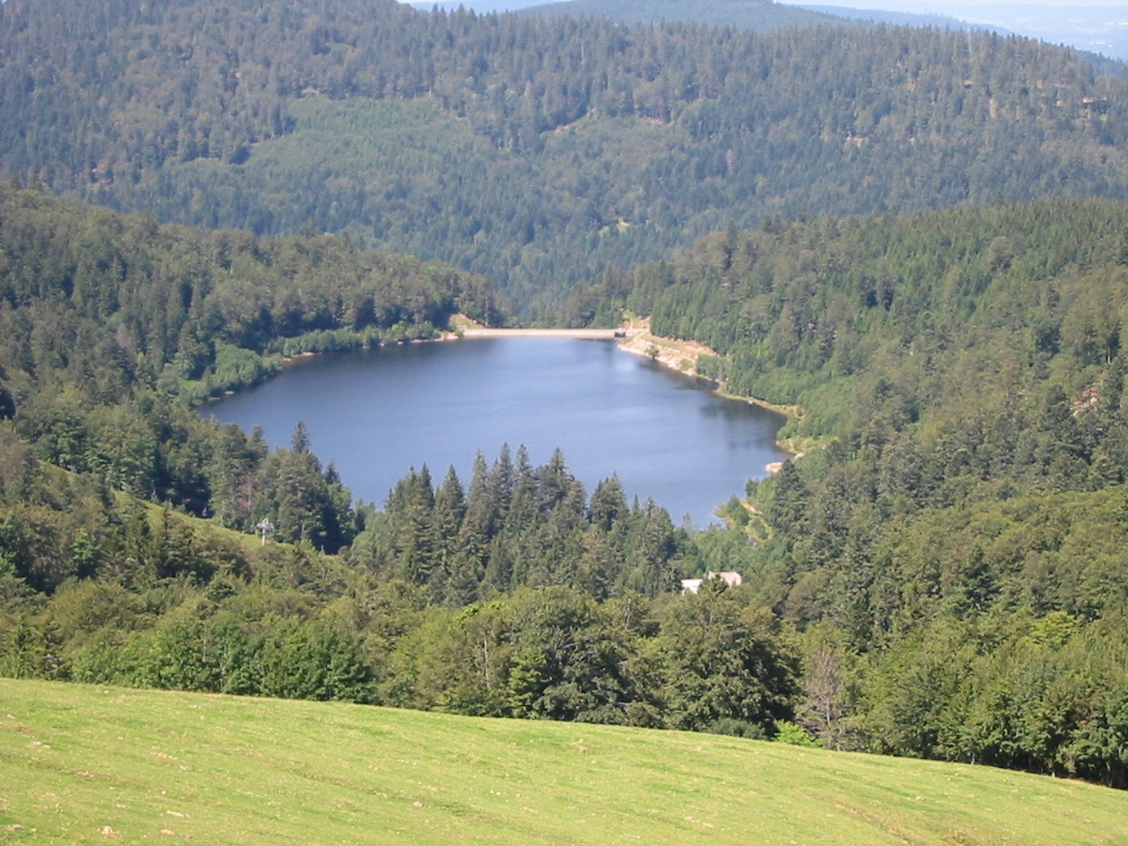 Lac de la Lande vu de la Route des Crêtes, commune de La Bresse (88250), France